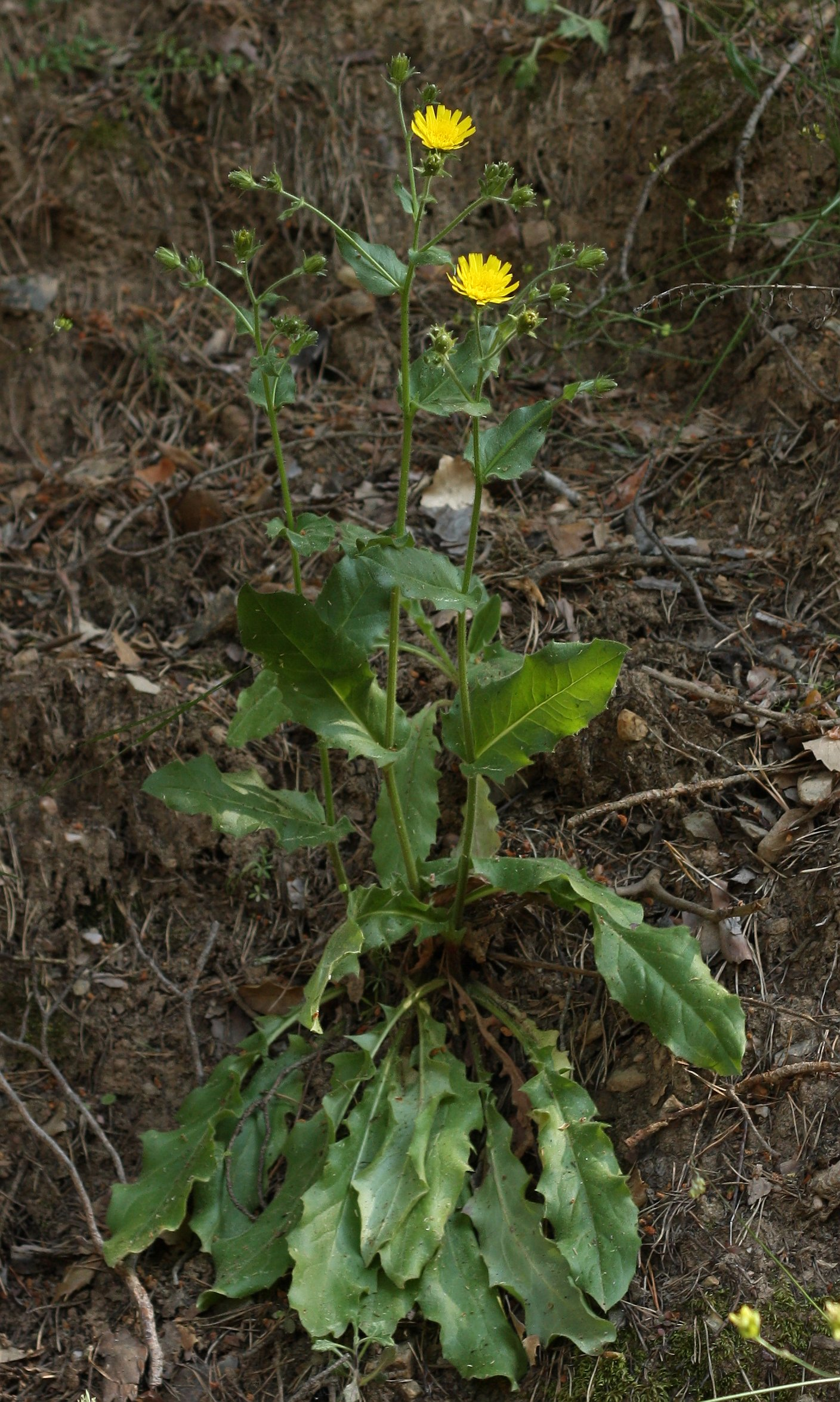 Hieracium amplexicaule L., planta sencera